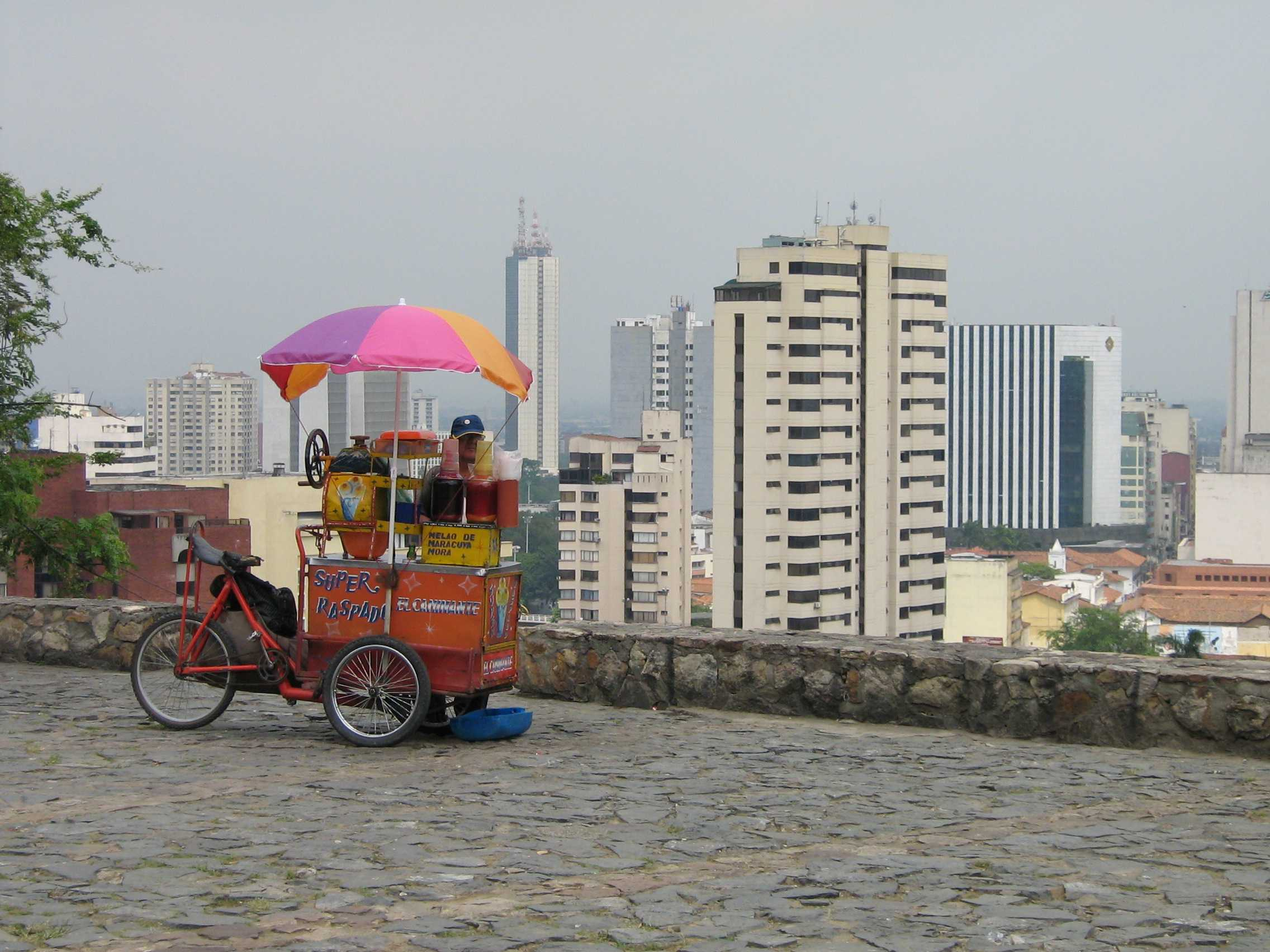 Venta de Cholados en la colina de San Antonio, Cali, Colombia